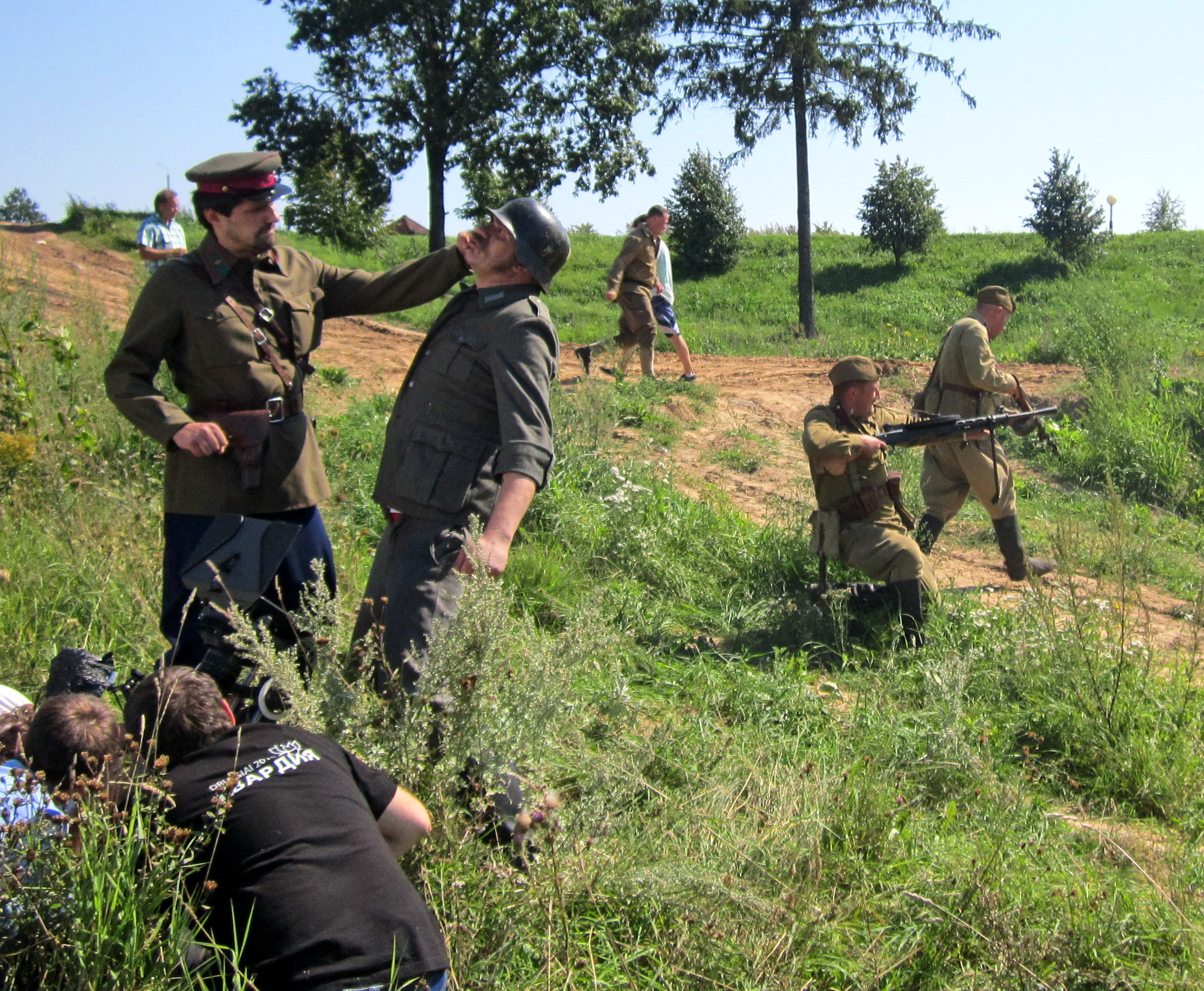 Съёмки фильма «PARTY-zan фильм». "Линия Сталина", Минский район.